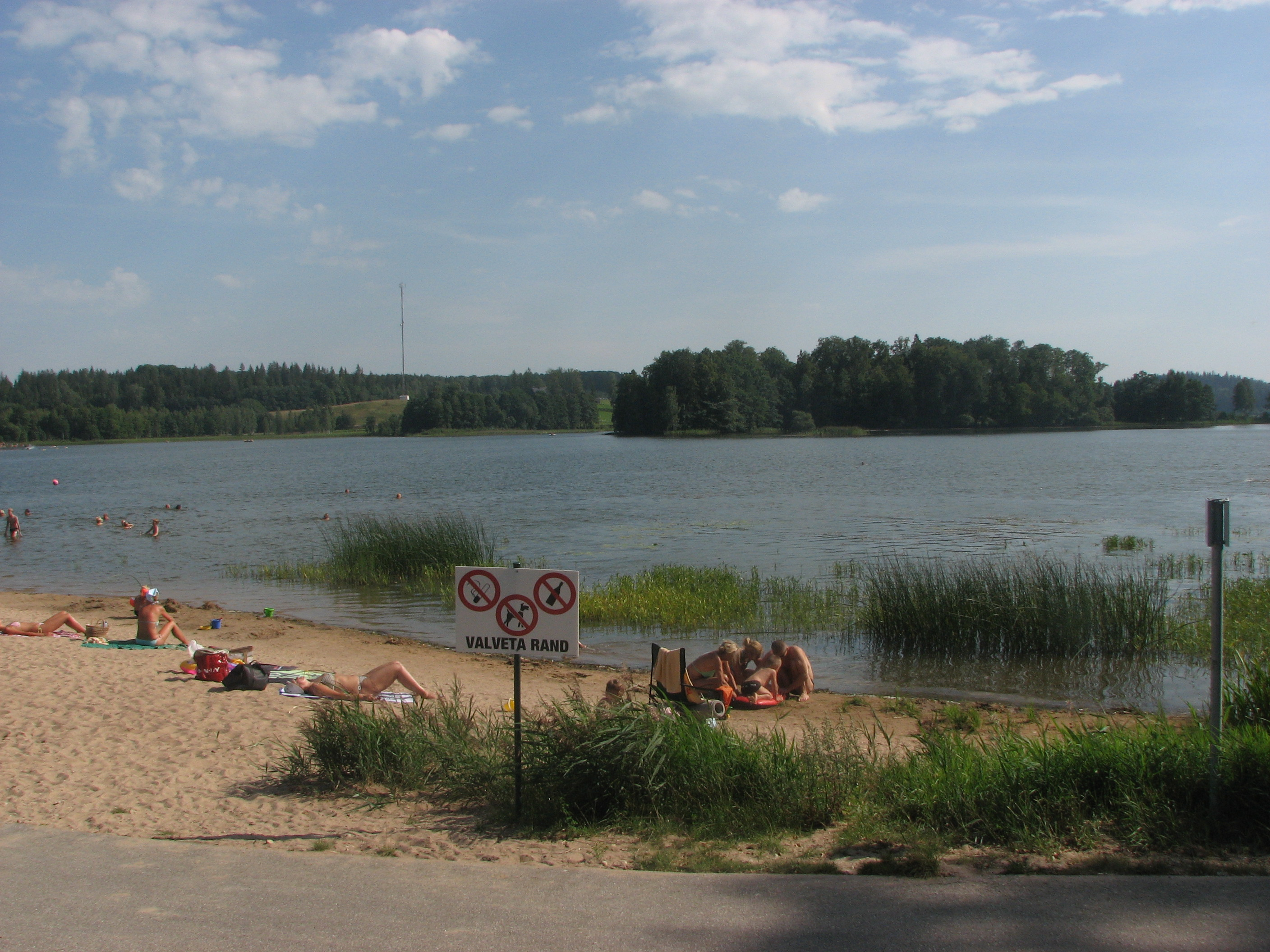 Pühajärv Lake in Otepää, Estonia